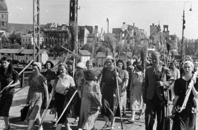 Heeresfilmstelle 355.244.4(47), (-201)(47), Unter Aufsicht eines Selbstschutzmannes werden Frauen zum Arbeitsdienst geführt. Aufnahme: 11.7.41, Riga, S.S.R.Lettland, Bildberichter: Dumm, Negativ-Nr.: M.216/14